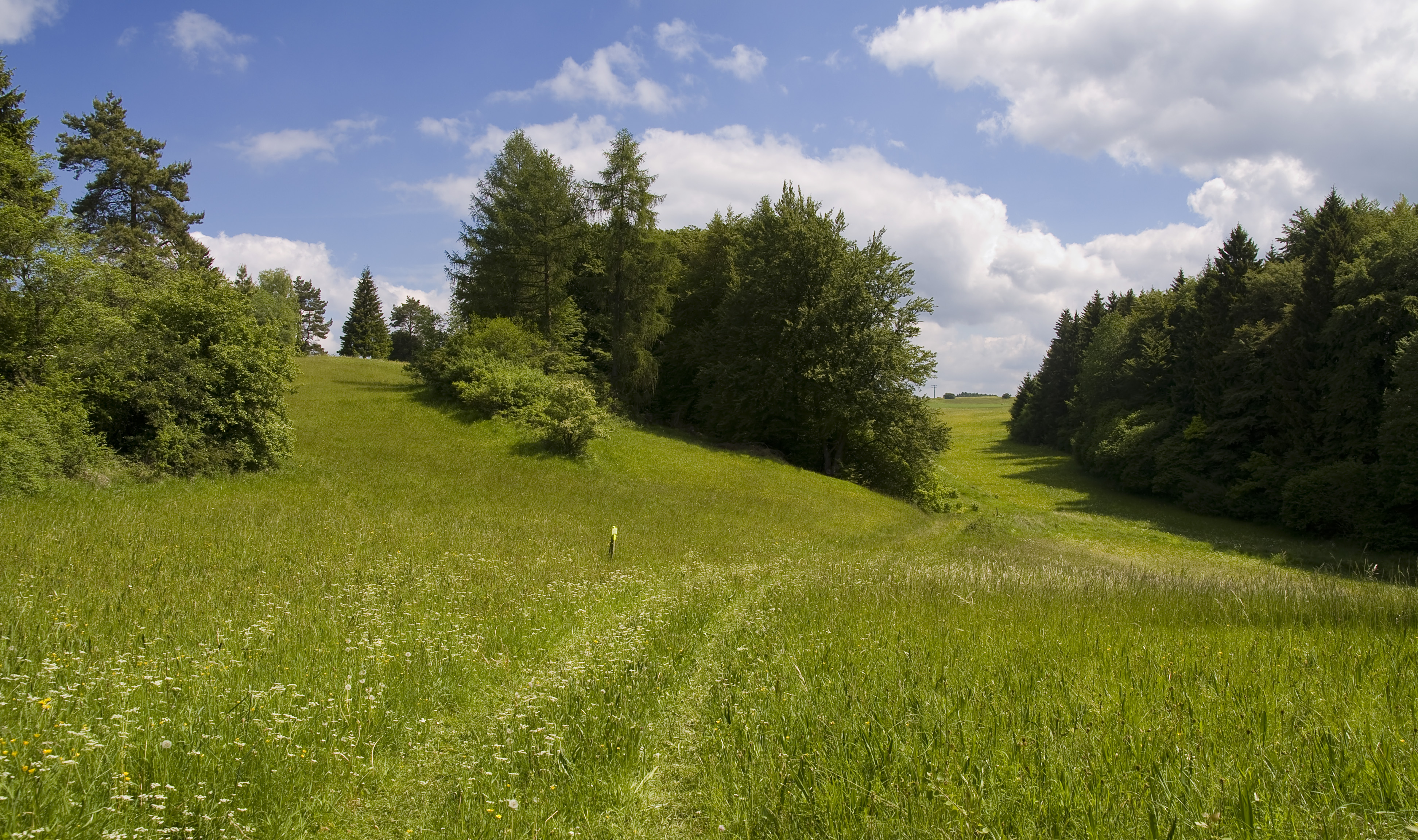 Seidenbachtal (?), am Froschberg, Naturschutzgebiet EU-015 „Nonnenbachtal und Seitentäler mit Froschberg und Gillenberg“ im Kreis Euskirchen, NRW